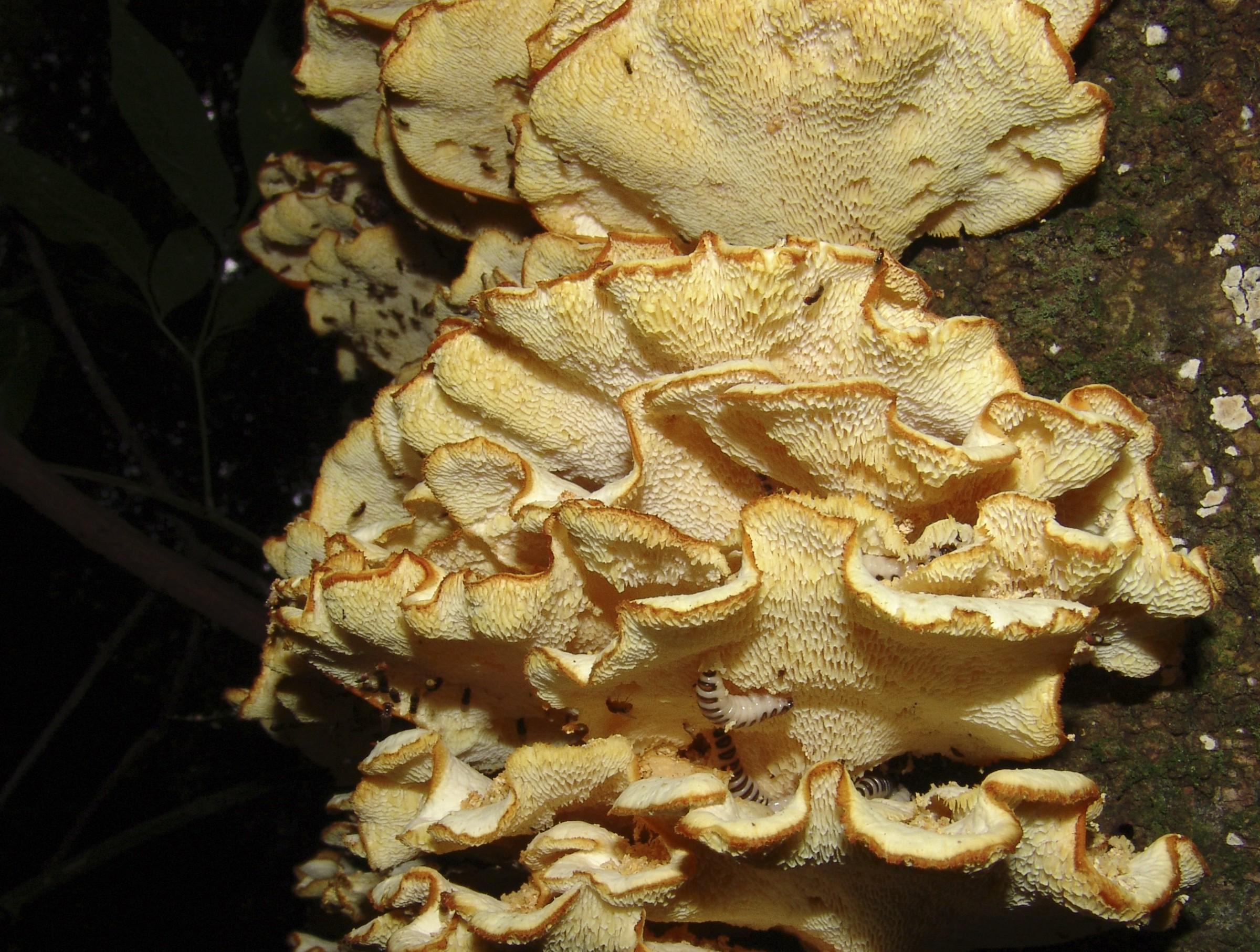 Fungi (Fungo, no tronco podre), Avaré, Brasil